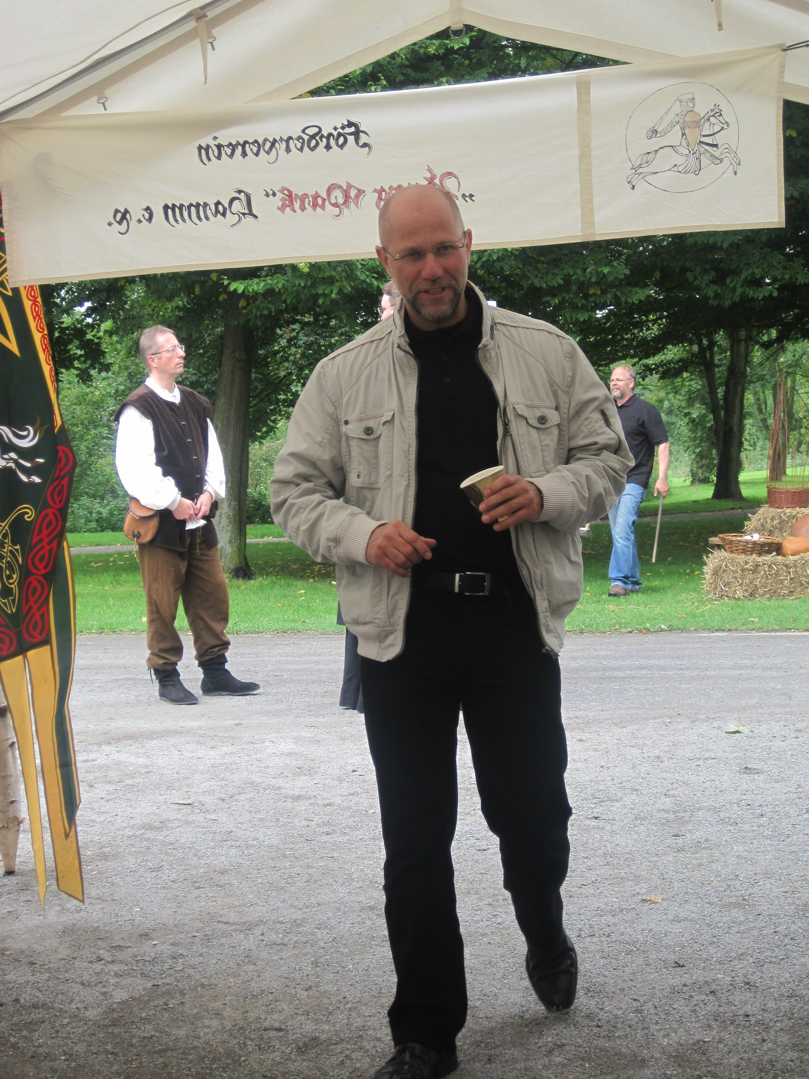 Das Foto zeigt den Gründer und Vorsitzenden des Fördervereins "Burg Mark" Hamm e.V., Herrn Uwe Richert.